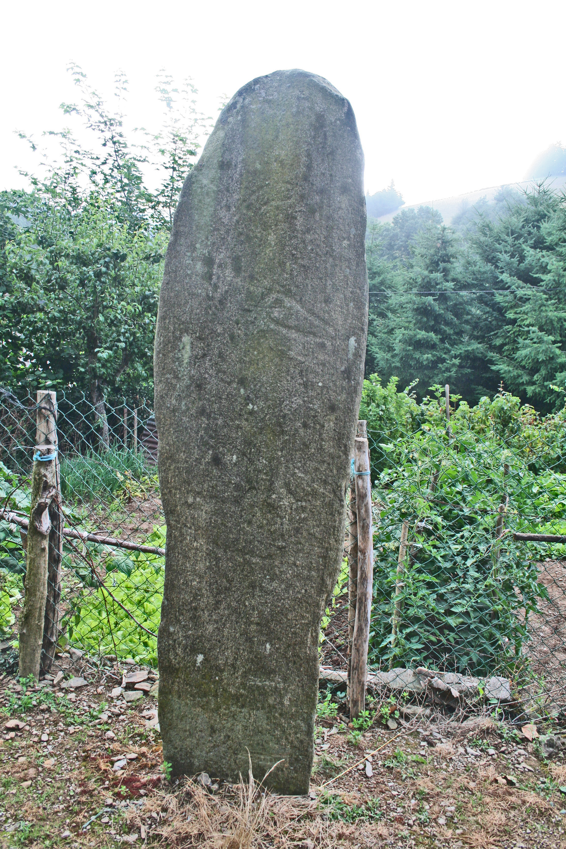 Barre (Tarn) - statue-menhir de Cantoul.